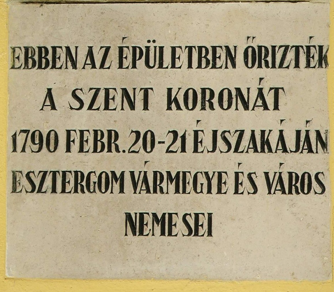 Emléktábla a Duna Múzeum falán.